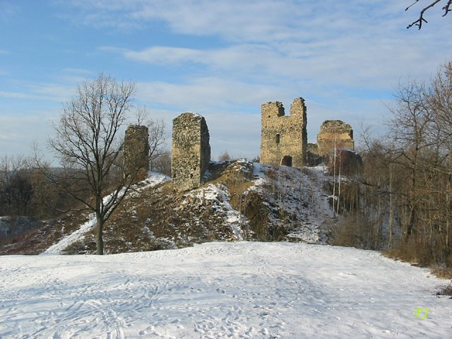 Brníčko (hrad)_8